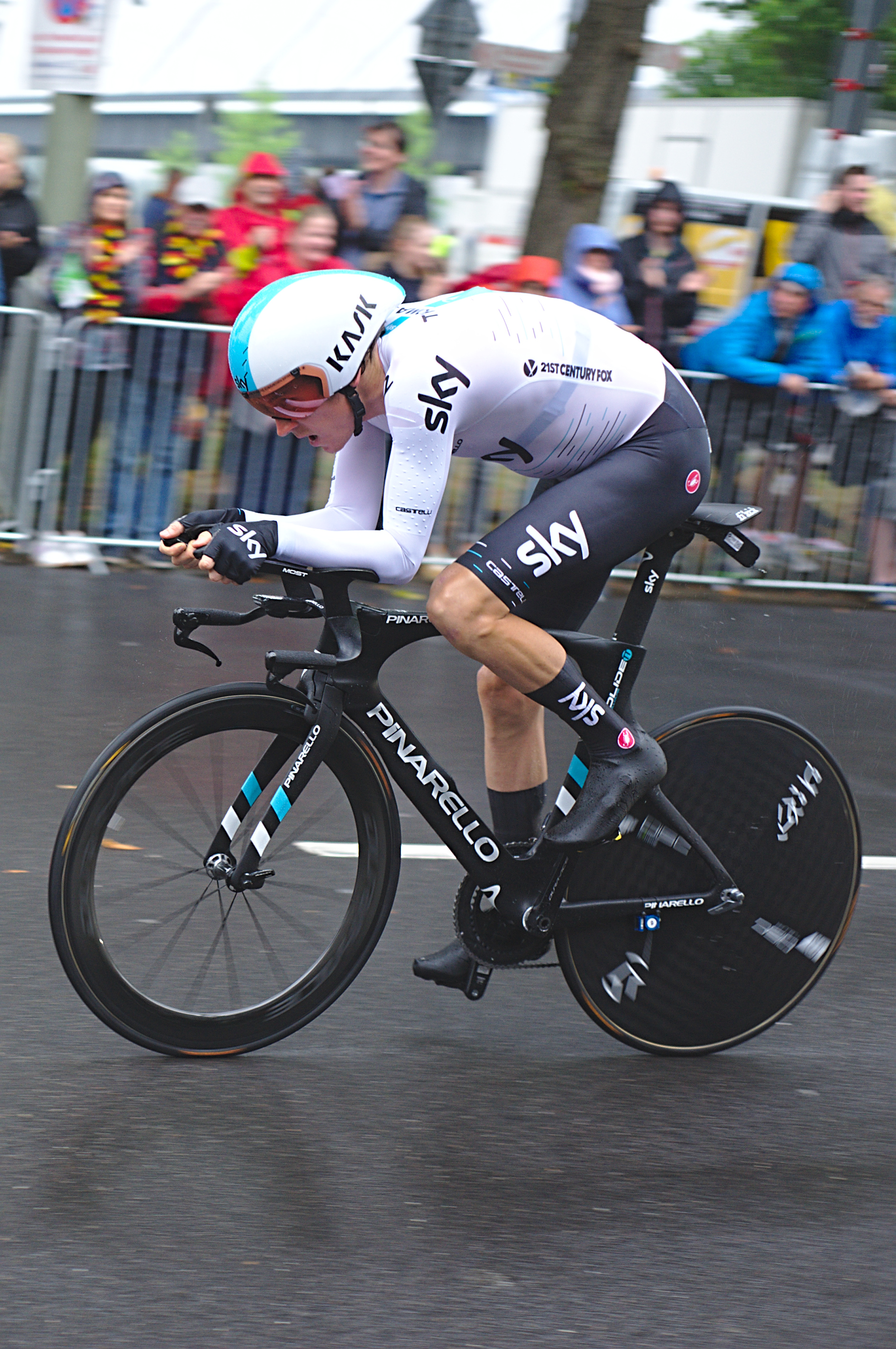 Einzelzeitfahren beim Grand Départ in Düsseldorf, Tour de France 2017.